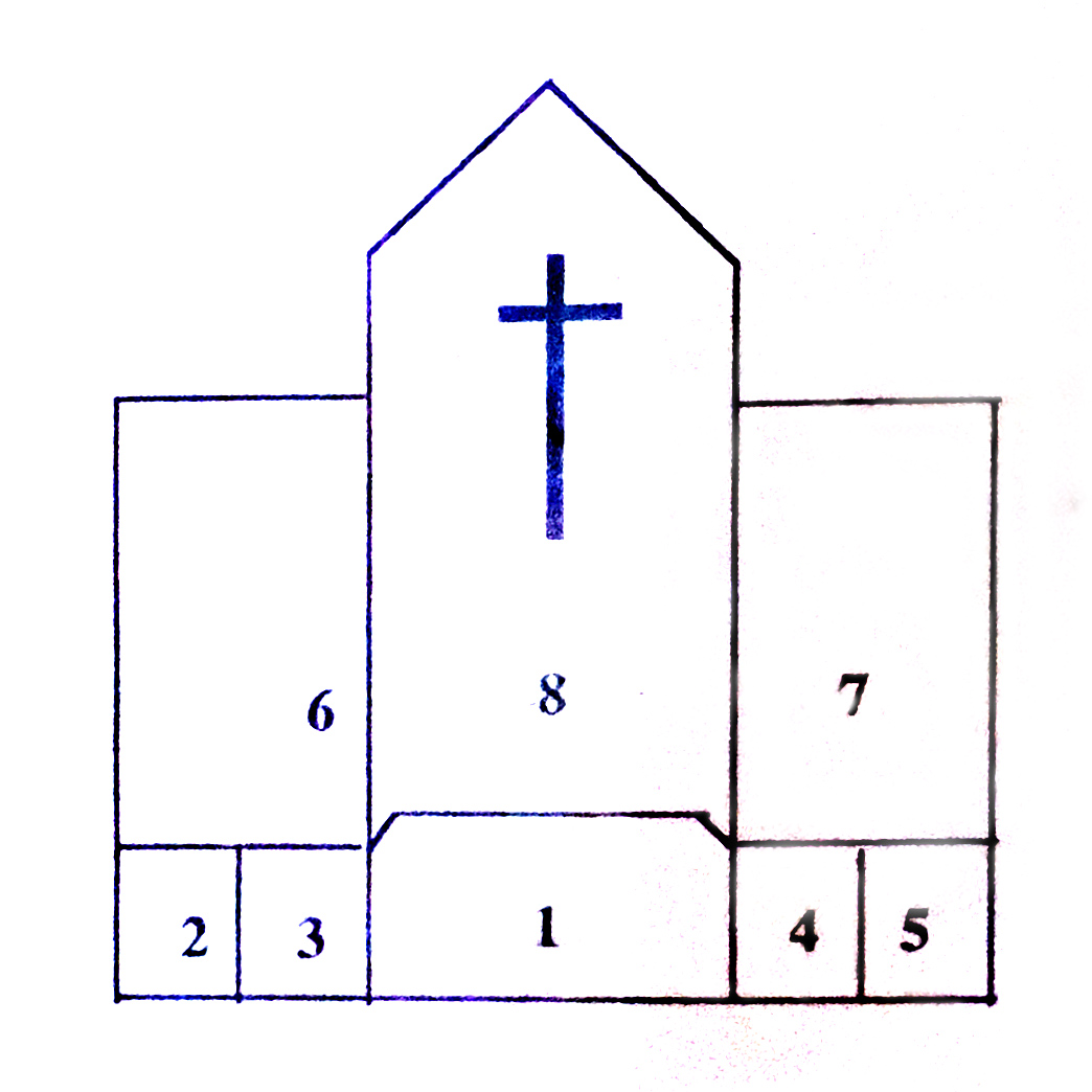 Retable flamand de l'église Saint-Germain-l'Auxerrois de Paris (schéma de l'organisation du retable) - Paris Ier